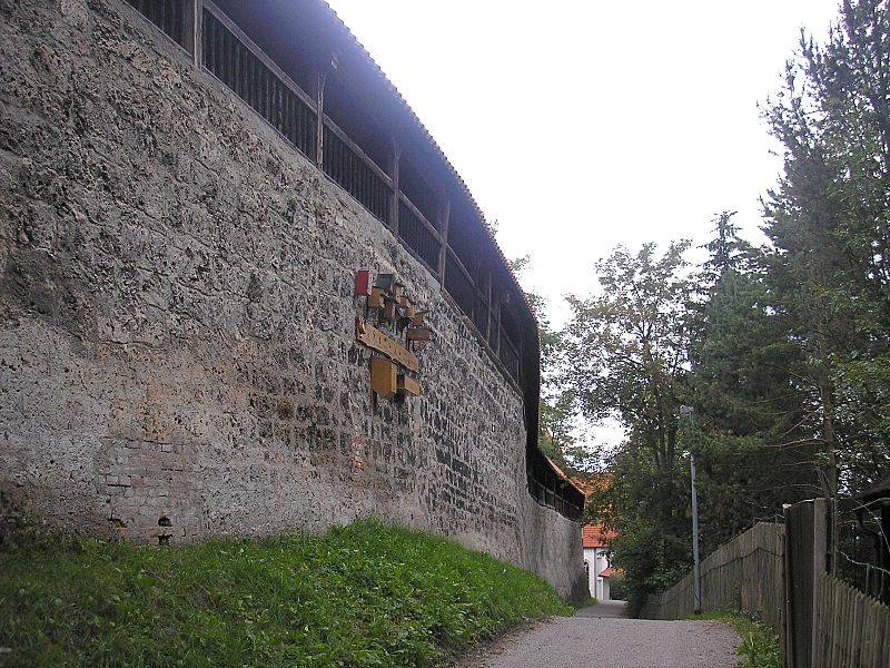 Stadtmauer Kaufbeuren (Bayerisch-Schwaben), im Hintergrund die gotische Kirche St. Blasius / Kaufbeuren (Bavaria, Germany), City Wall with Church St. Blasius (background). Eigene Aufnahme, Aug. 2006 / Own photo, Aug. 2006